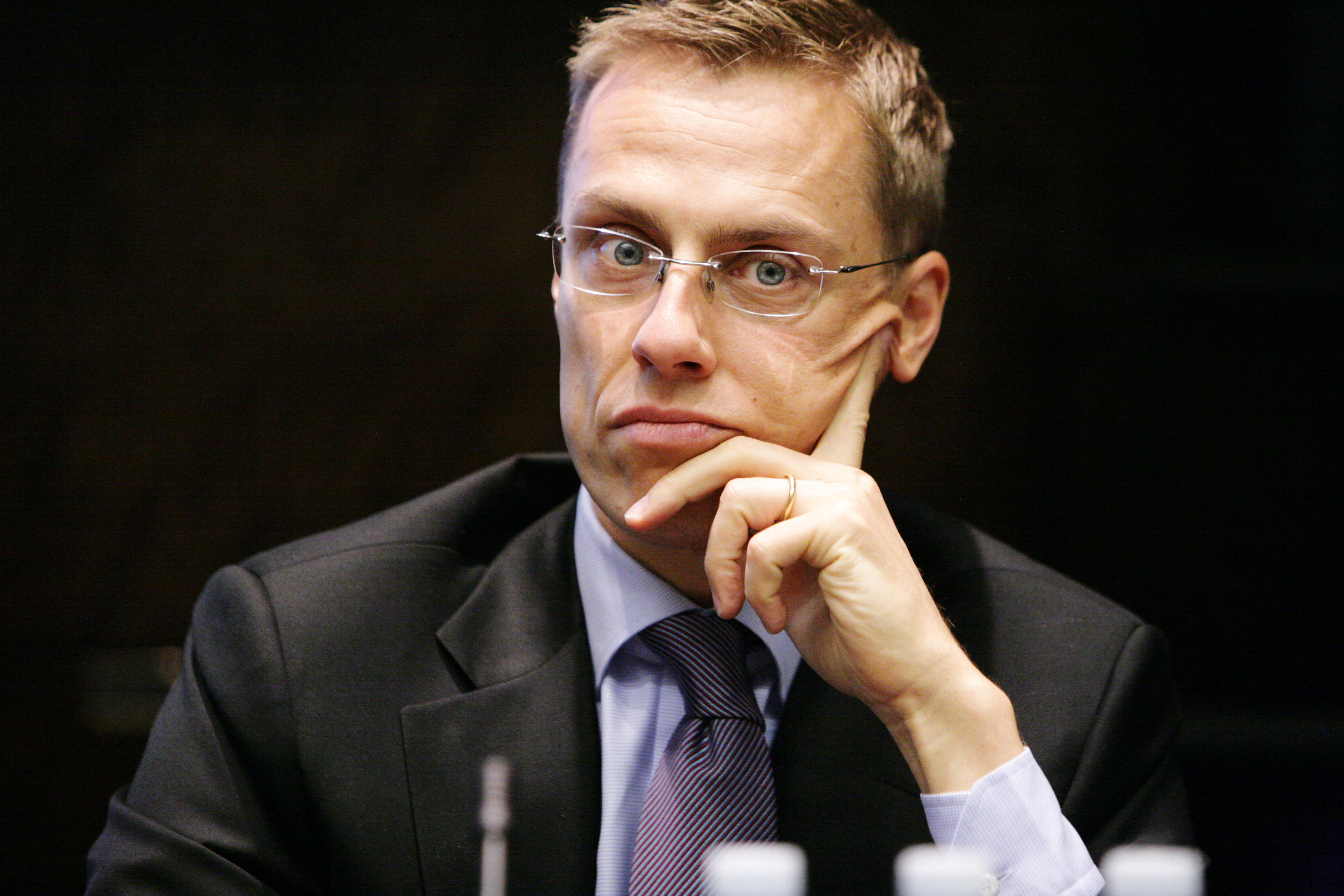 Finlands utrikesminister Alexander Stubb vid Nordiska rådets session i Helsingfors 2008-10-27.